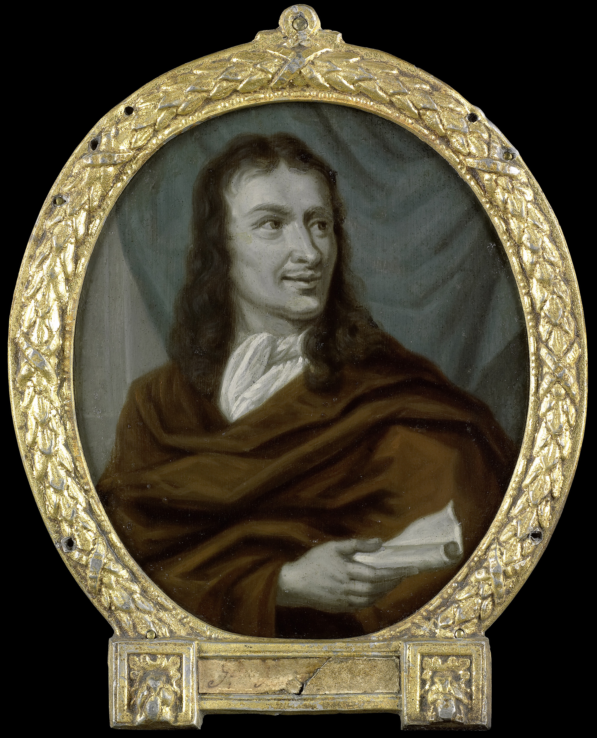 Portret van Pieter Verhoek (1633-1702). Dichter en marmerschilder te Amsterdam. Buste in ovaal, naar rechts, een rol papier in de rechterhand. Vervaardigd naar een anonieme prent. Onderdeel van een verzameling portretten van Nederlandse dichters. Collection: schilderijen; Panpoeticon Batavum